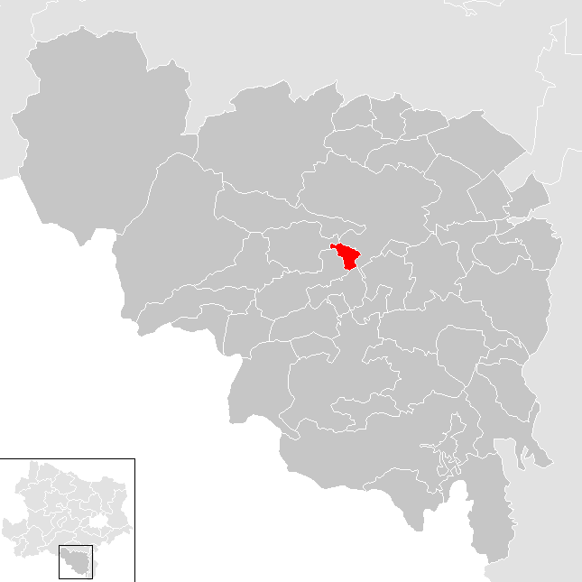 Bezirk Neunkirchen